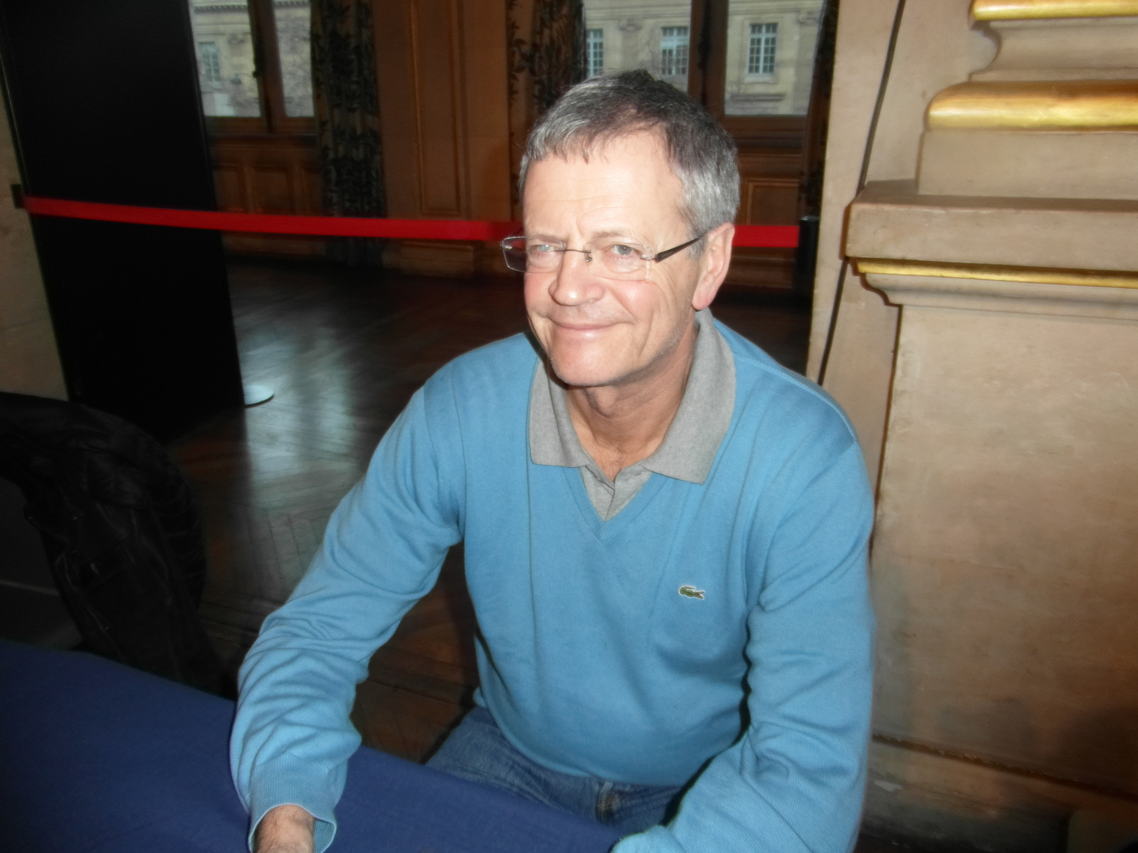 Maghreb des Livres, 7 et 8 février 2015